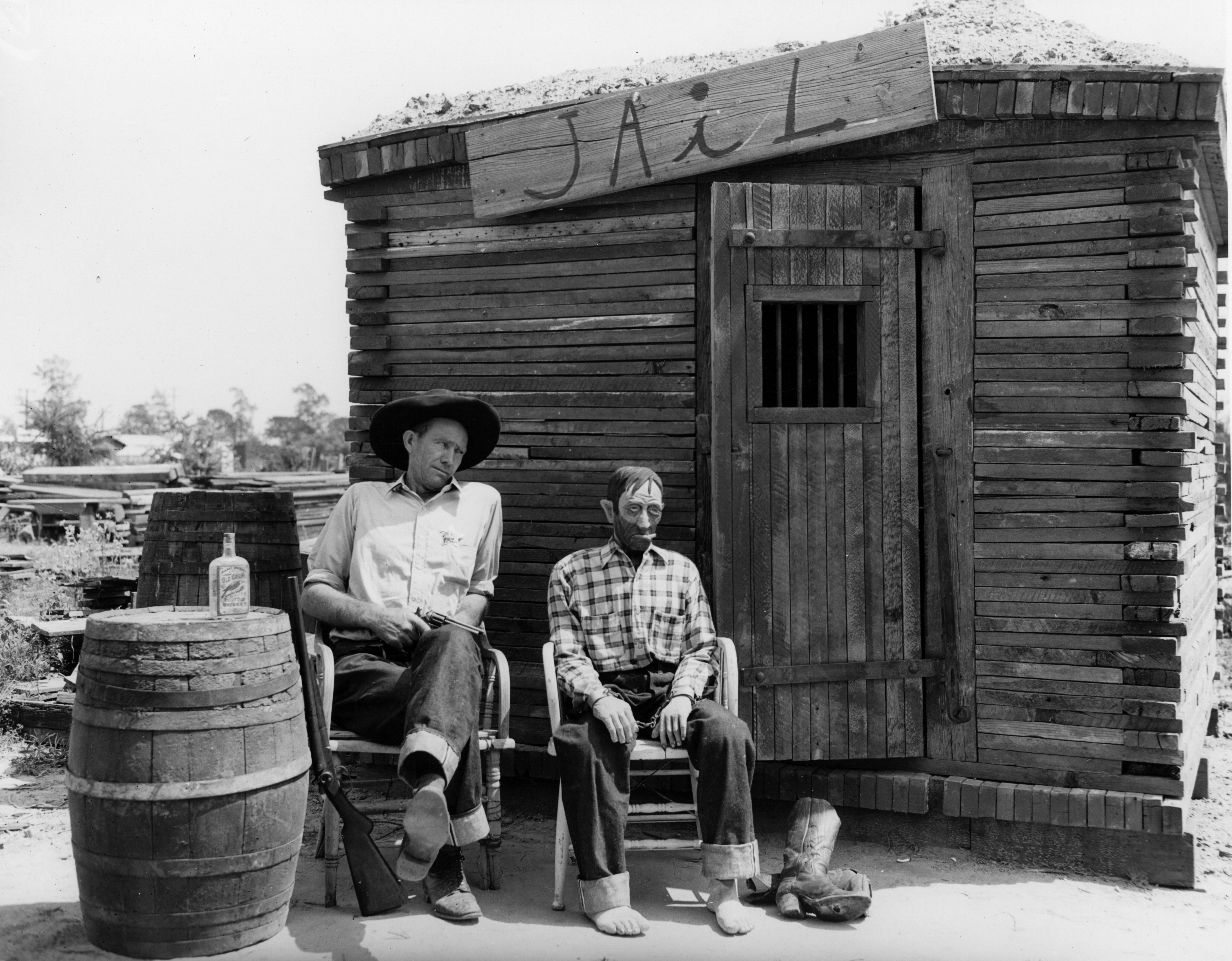 H. S. "Andy" Anderson